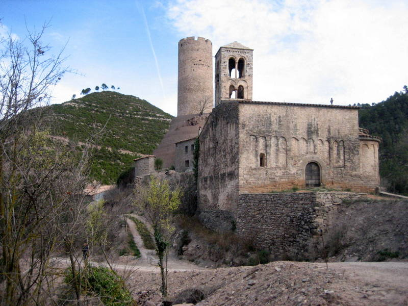 castell i església Coaner a Sant Mateu de Bages - Catalunya